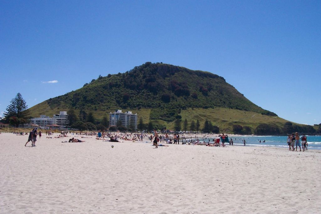 Mt Maunganui.